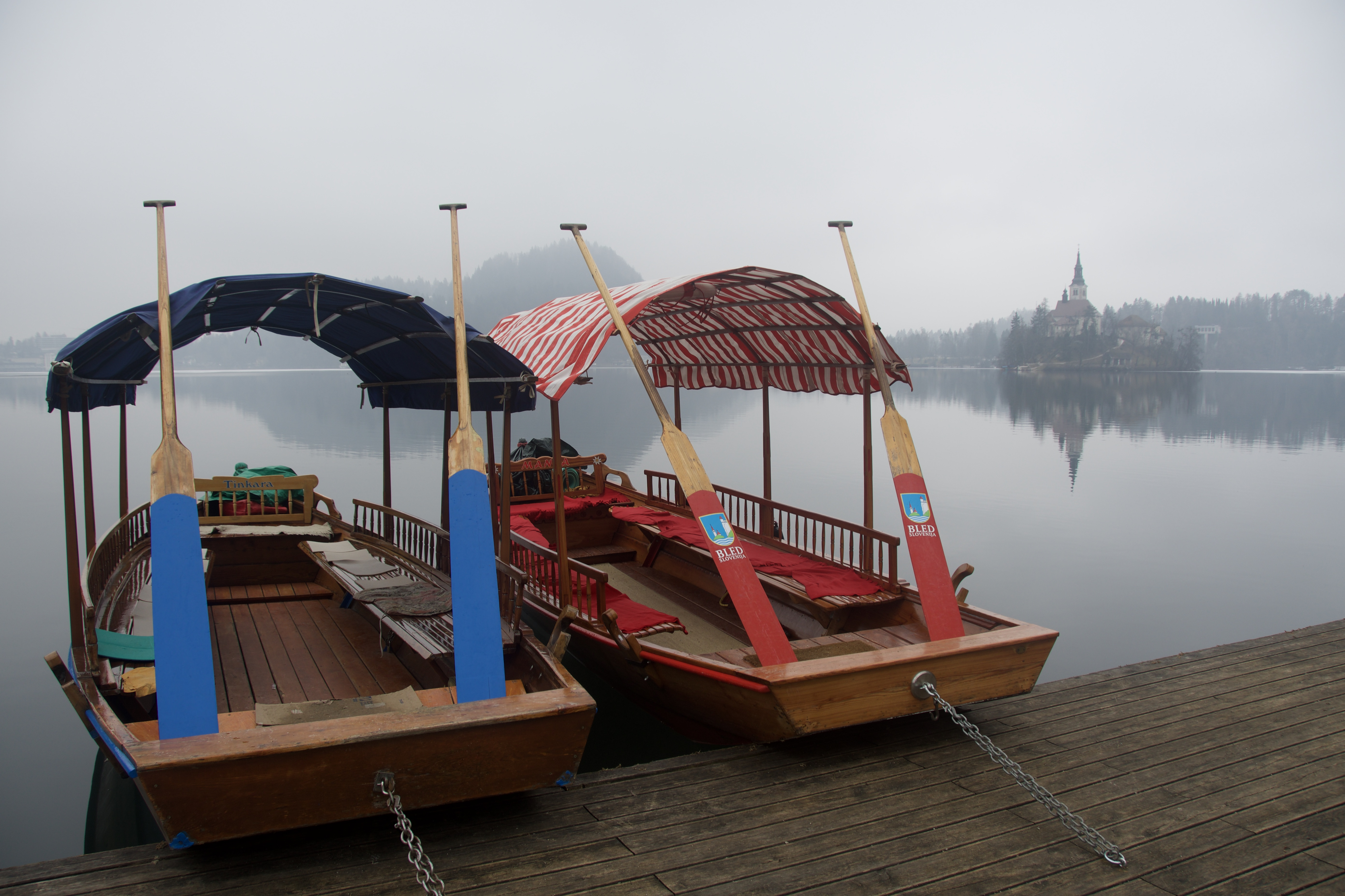 Lake Bled, Slovenia